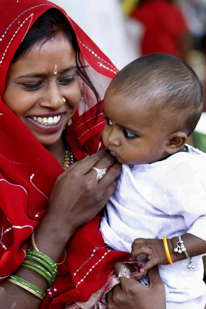 India